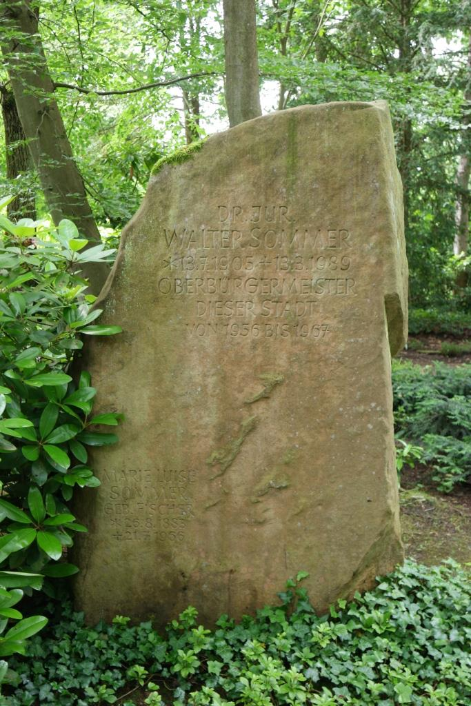 Grab des Juristen und Politikers Walter Sommer (1905-1989) auf dem Hauptfriedhof Kaiserslautern